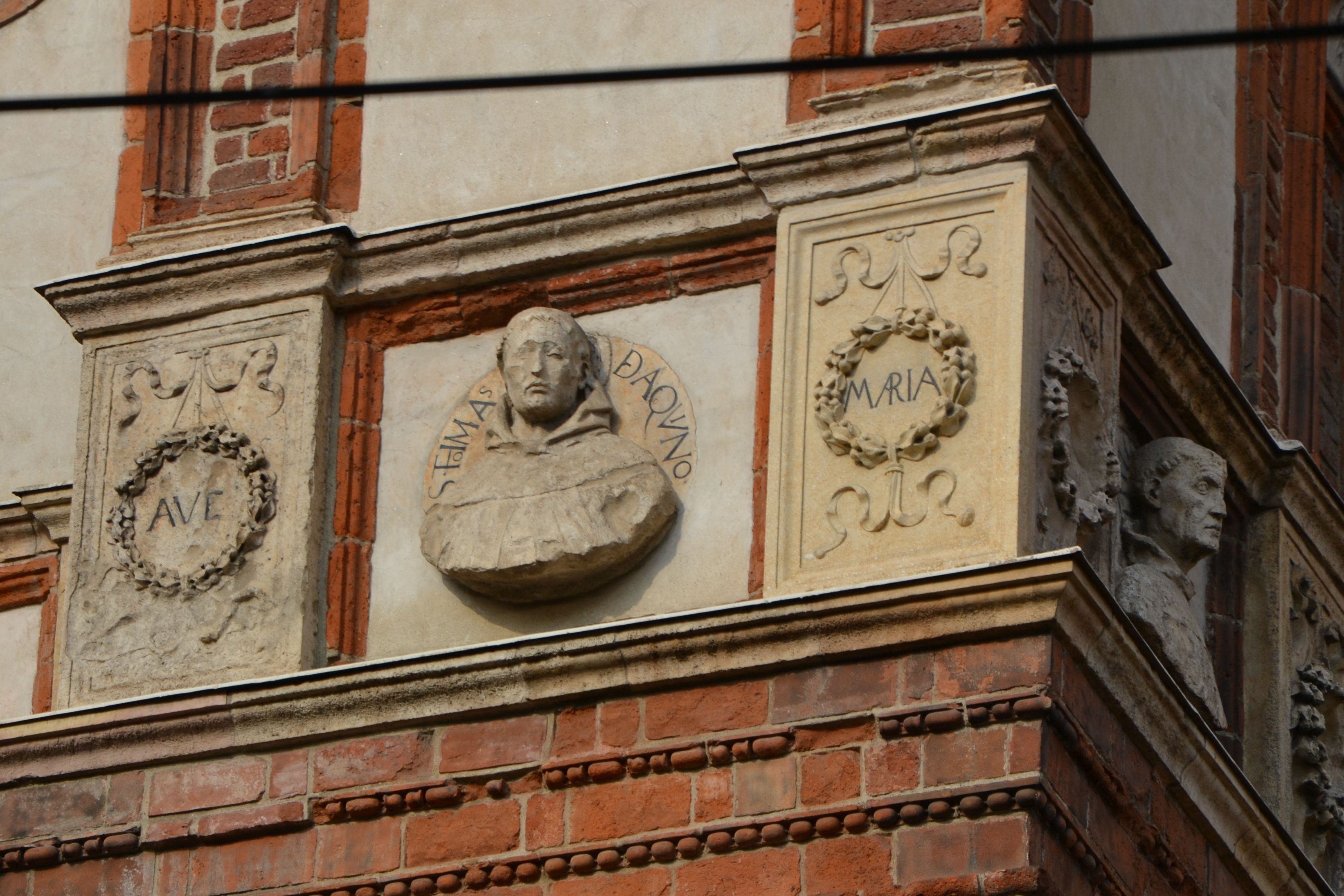 Santa Maria delle Grazie (Milan) - Apse exterior